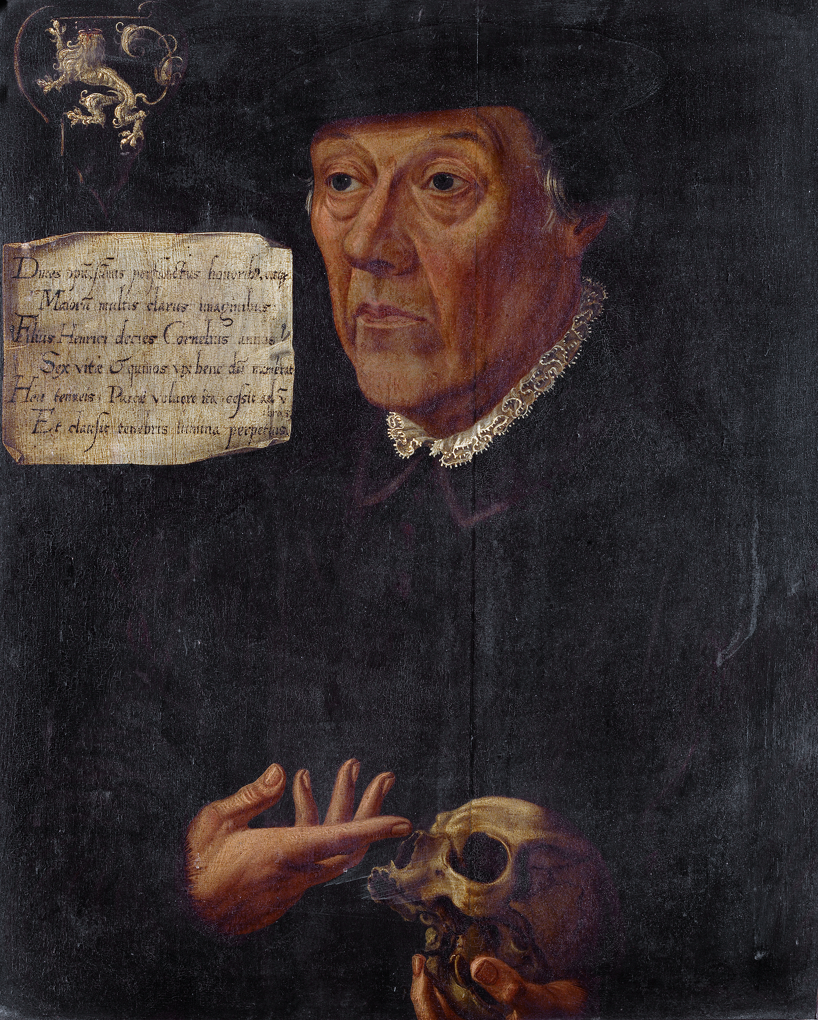 Portret van Cornelis Hendricksz Loen (1481-1547) tussen 1529 en 1533 burgemeester van Amsterdam geschilderd door een onbekende schilder